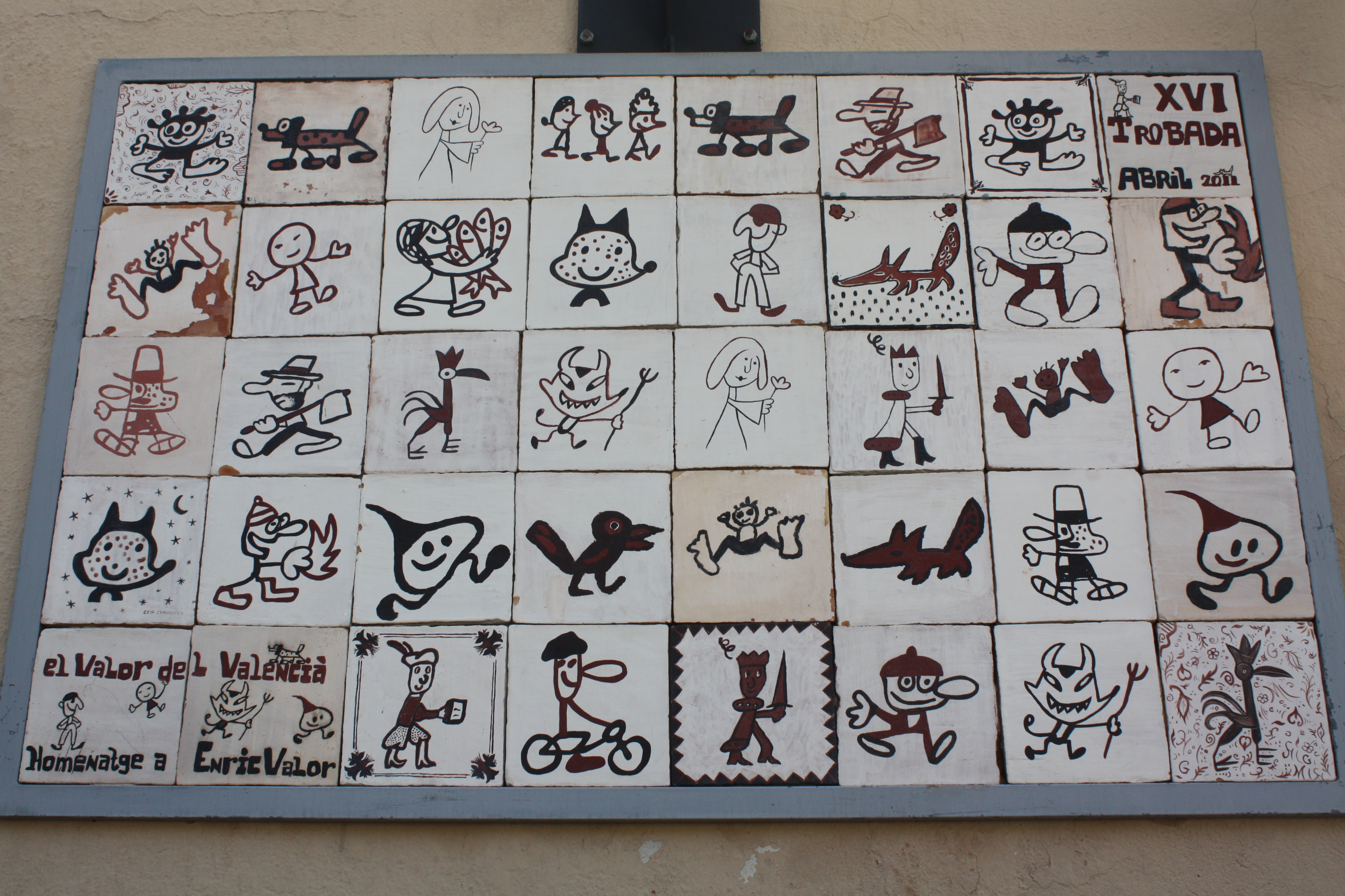 Mosaico en homenaxe a Enric Valor, en Sagunt (Valencia). Enric Valor i Vives (1911-2000) foi o principal recuperador da lexicografía valenciana.